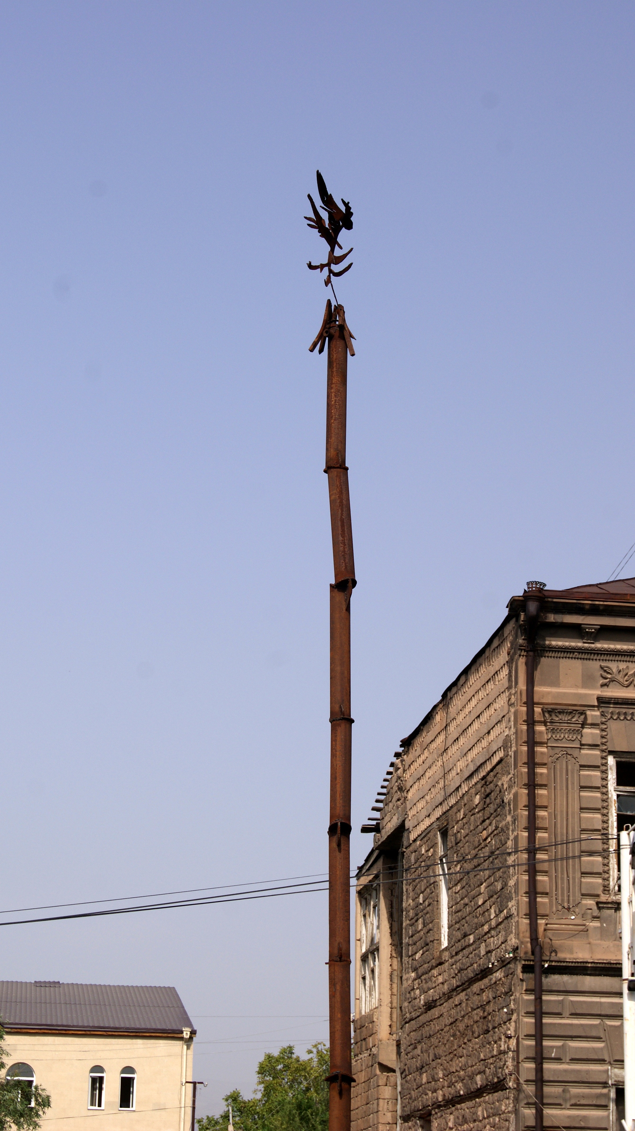 Խաղաղության ծառ, Աշտարակ 1/5